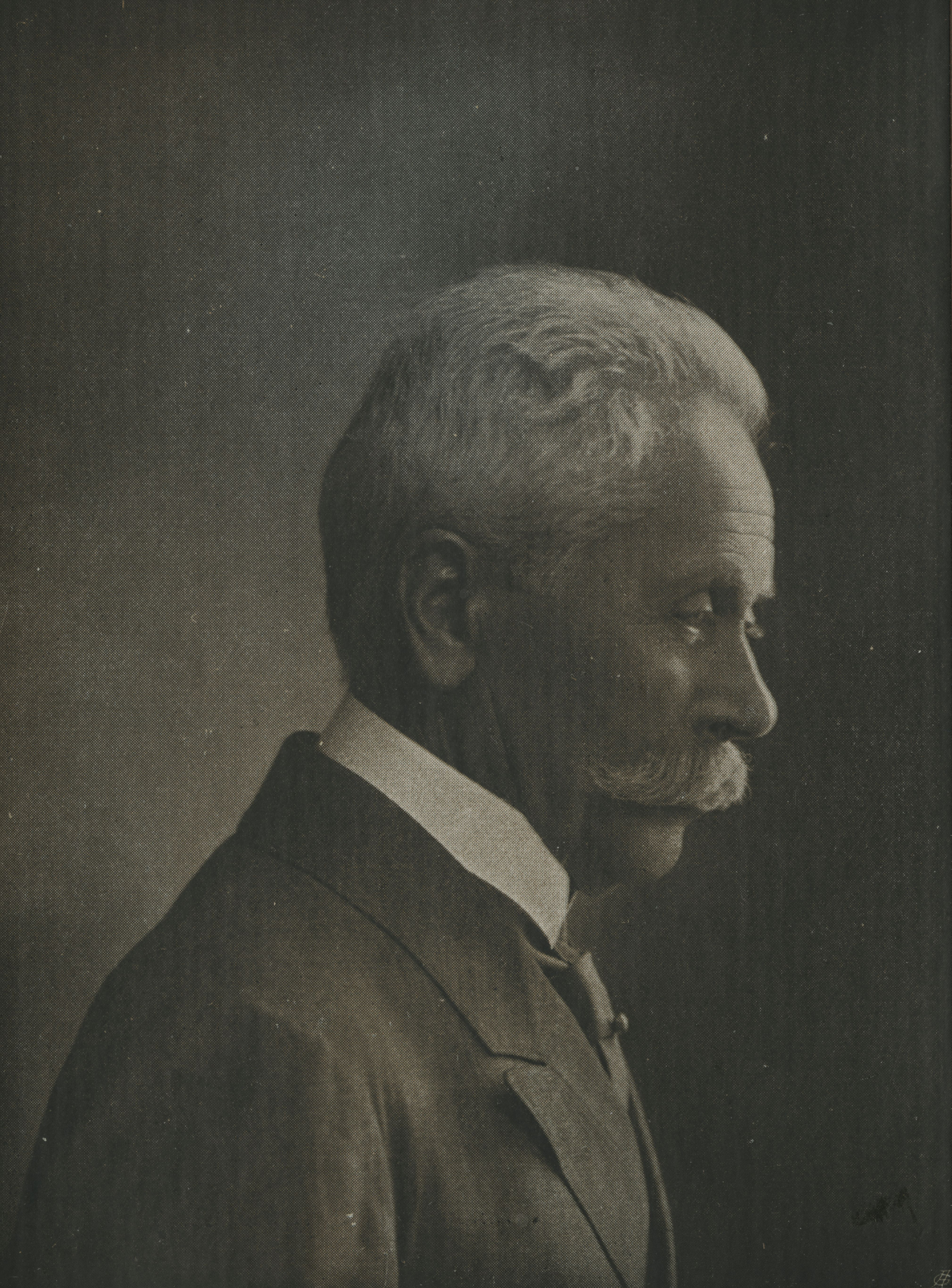 Feliks West - polski księgarz i wydawca, zdjęcie z książki "Katalog wydawnictw księgarni nakładowej Feliksa Westa w Brodach"